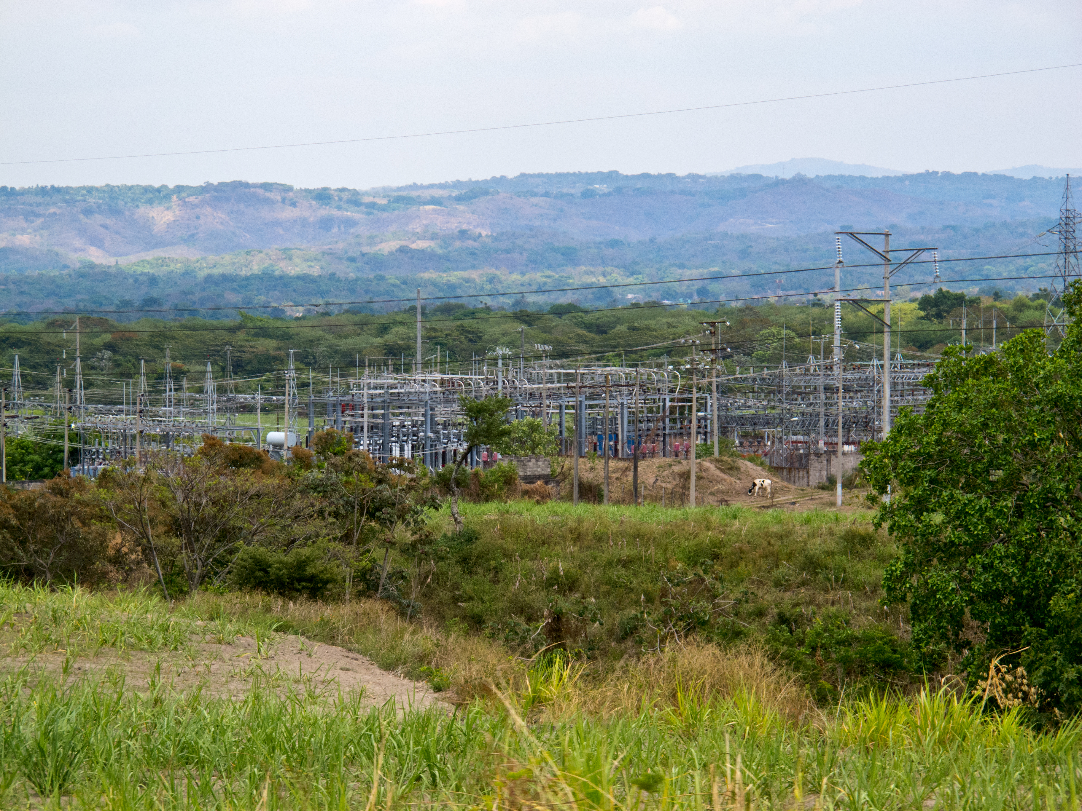 Parte de la red electrica de El Salvador, una subestación, cerca Nejapa.